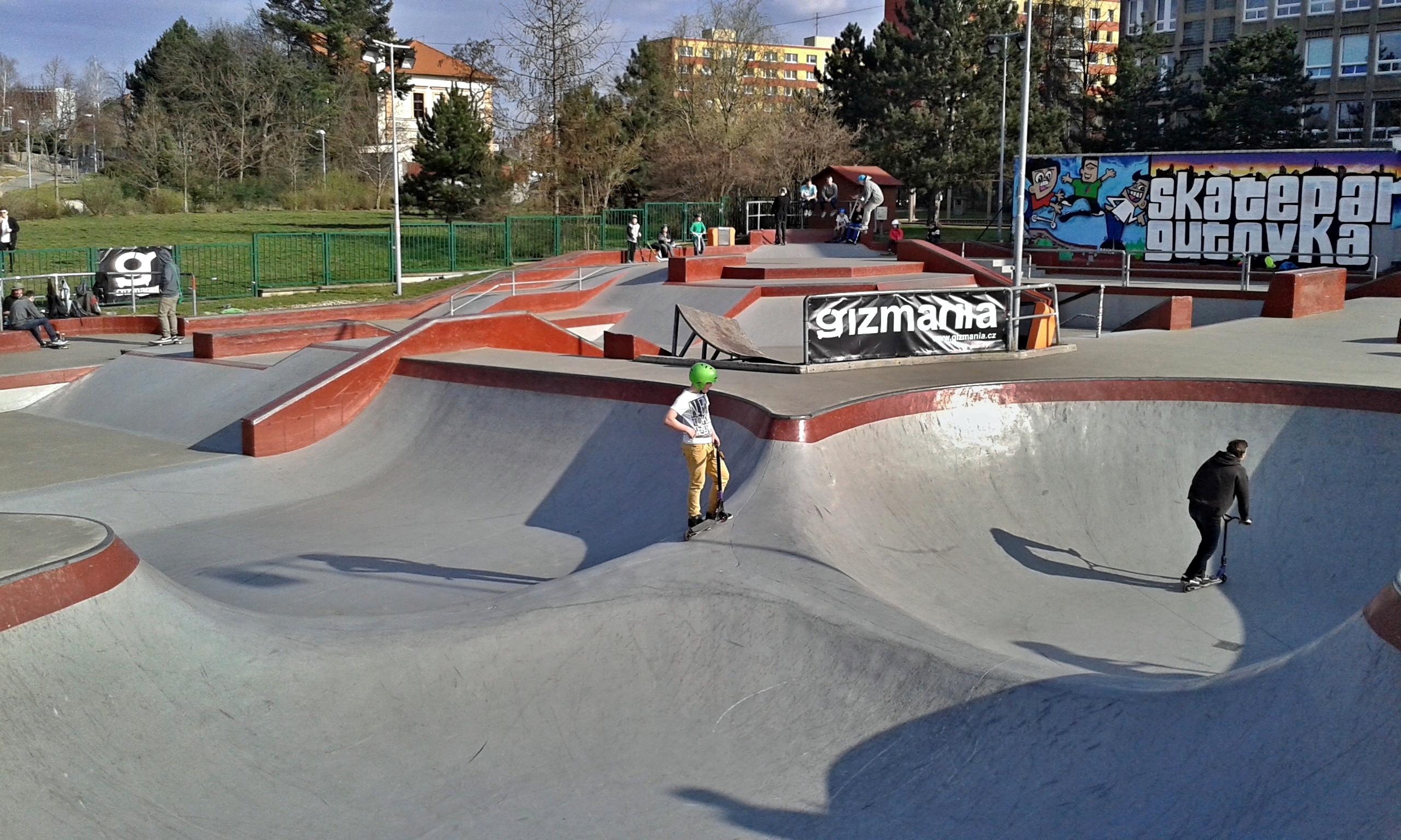 Areál volného času Gutovka Praha-Strašnice, U-rampa a koryto